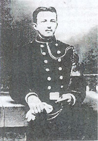 Léon Trésignies (1886-1914) - héros belge de la Première guerre mondiale.